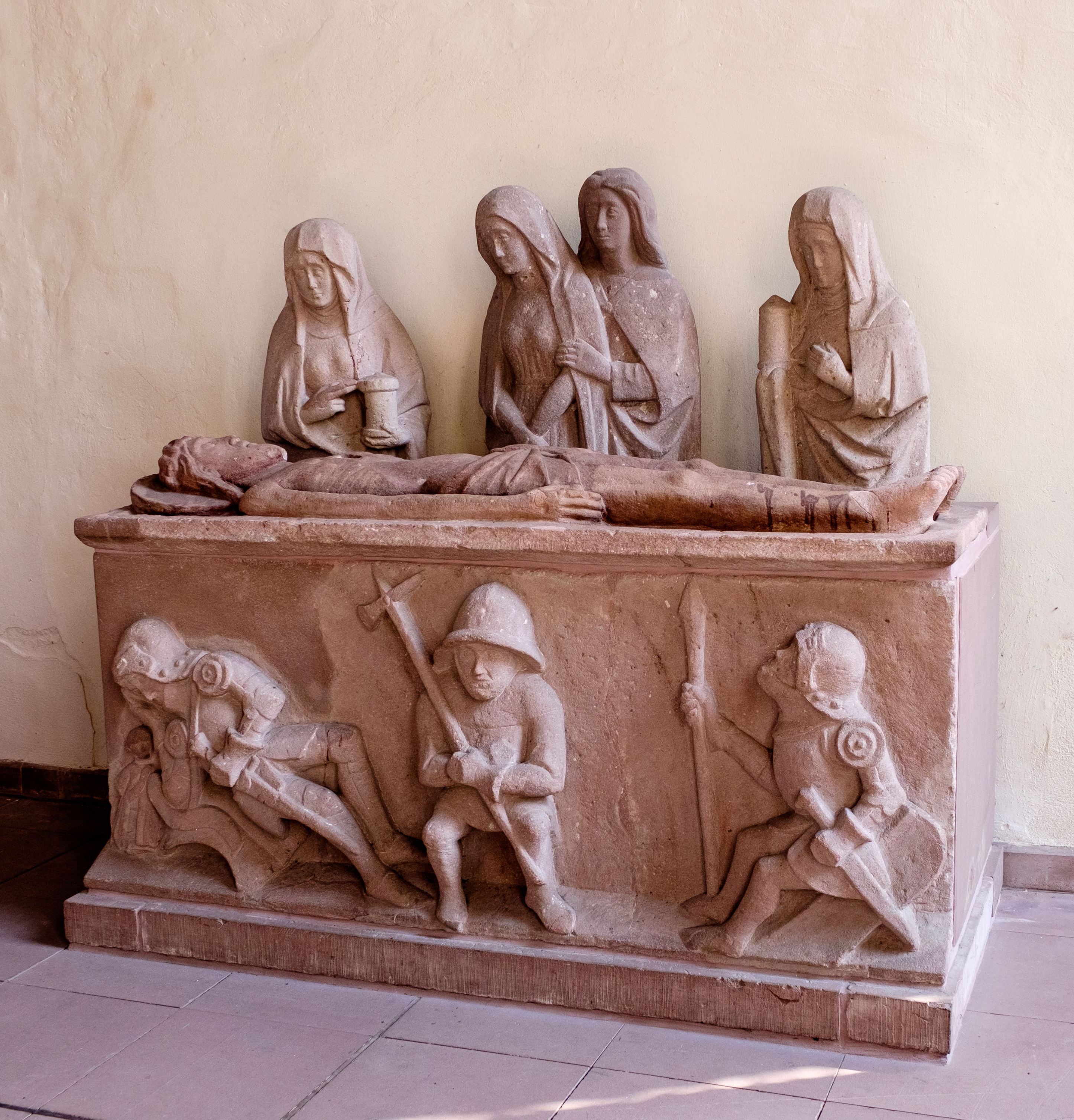 Heiliges Grab in der Katharinankirche in Steinau